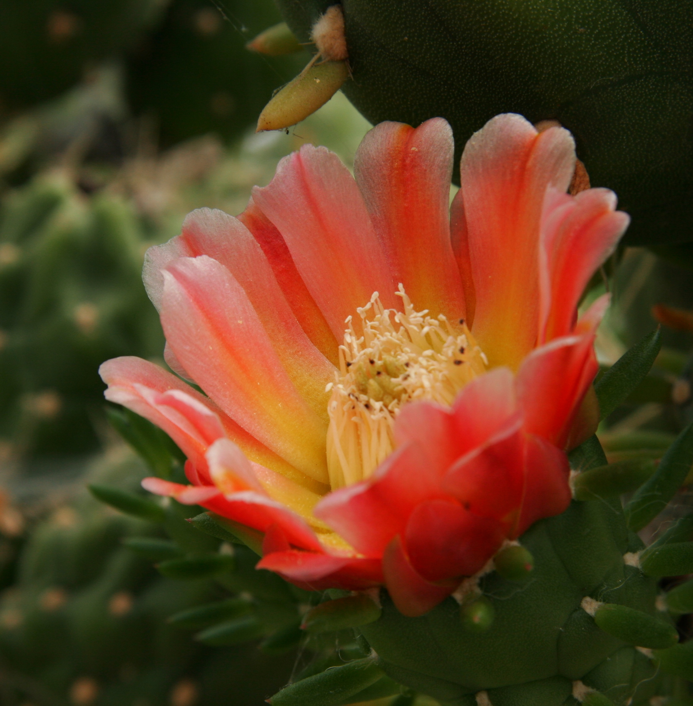 i080106a 031